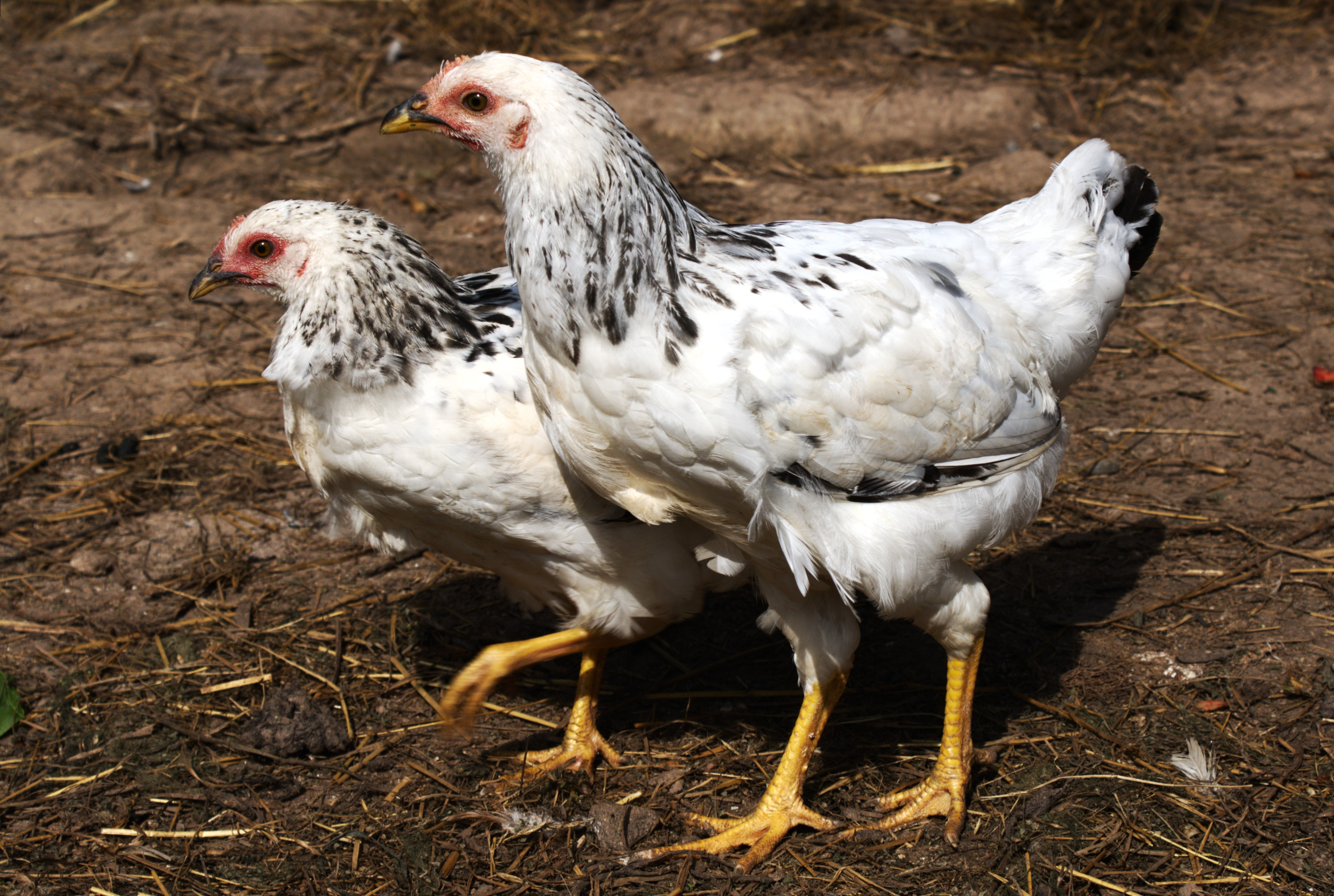 Два подросченных адлерских цыпленка гуляют по загону (возраст 3 месяца).